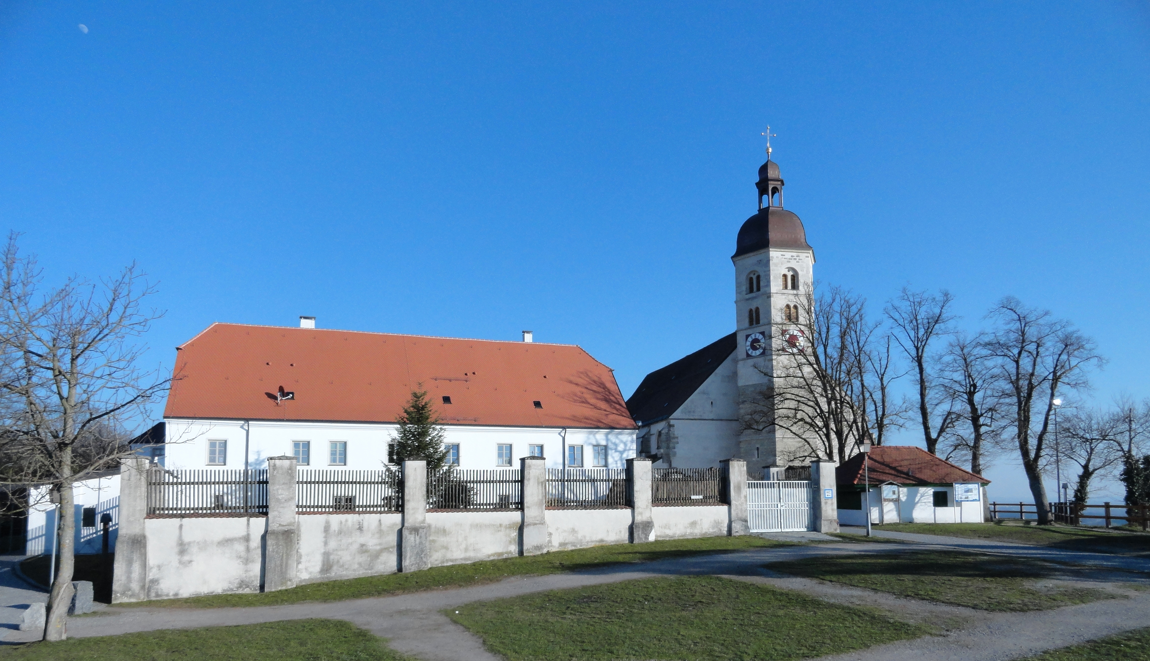 Bogenberg; links: Bogenberg 10, das Pfarrhaus, ein stattlicher, zweigeschossiger Massivbau mit Krüppelwalmdach, im Kern 1675, nach Brand 1803 erneuert; im Vordergrund links: der Pfarrgarten mit Einfriedung, verputzte Ziegelsteinpfeiler mit Holzlattenzaun auf umlaufendem Mauerwerk, wohl gleichzeitig; rechts: Kirche Hl. Kreuz und Mariä Himmelfahrt (Bogenberg 9); davor rechts: Verhaufshäuschen für Devotionalien